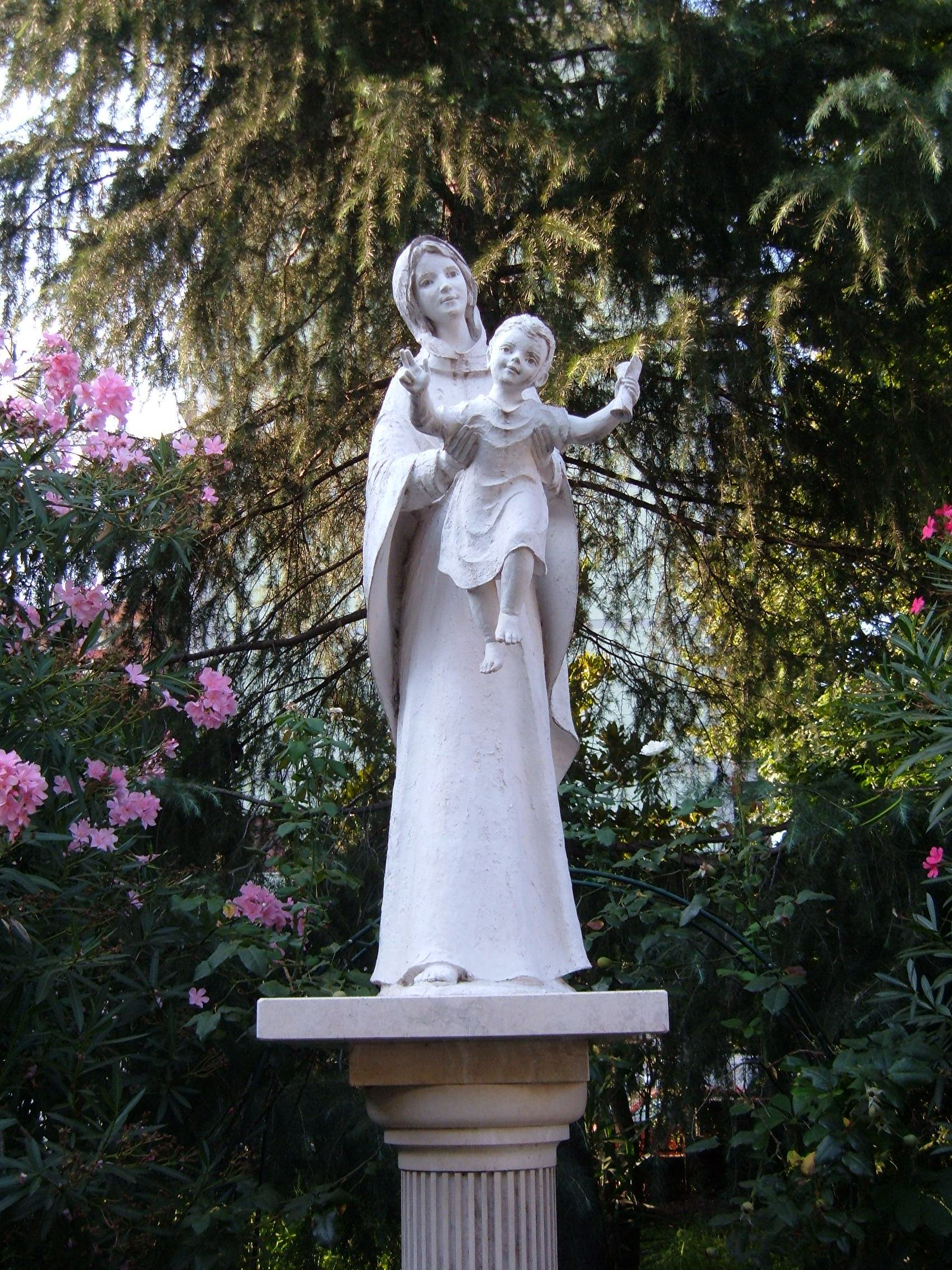 Chiesa di Santa Giulia Billiart, a Roma, nel quartiere Tuscolano. Esterno: statua.